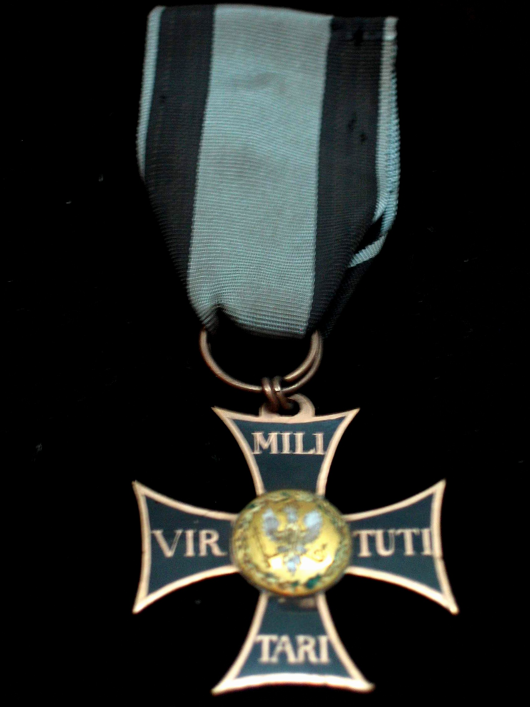 Order Virtuti Militari 1792 author User:Mathiasrex Maciej Szczepańczyk